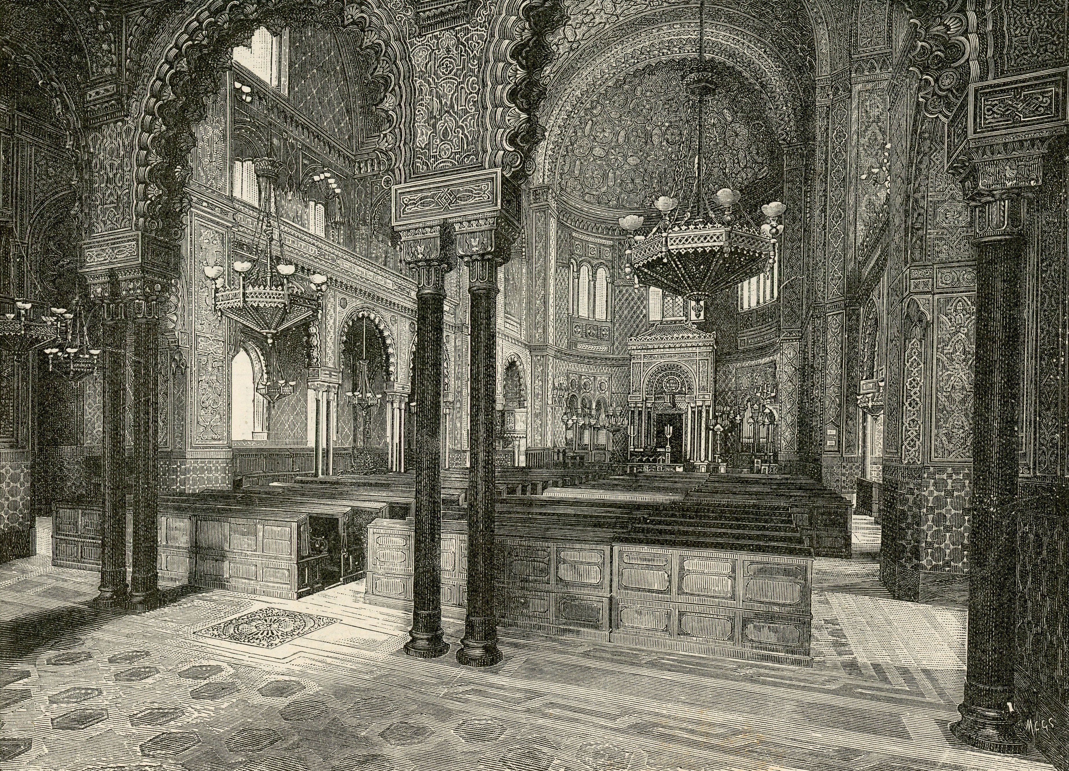 Firenze: interno del Tempio Israelitico (xilografia di MCGS).